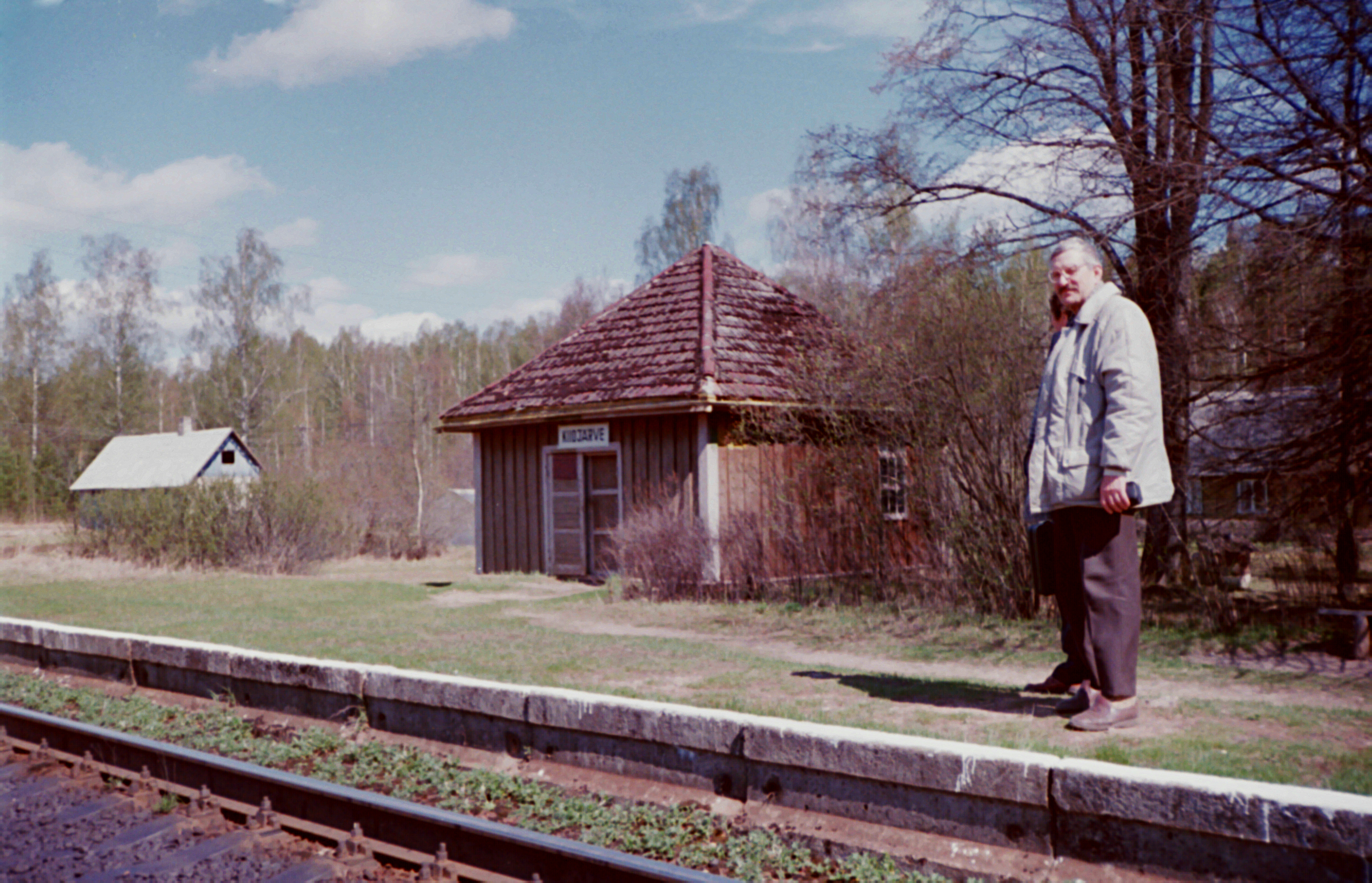 Kiidjärve raudteepeatus